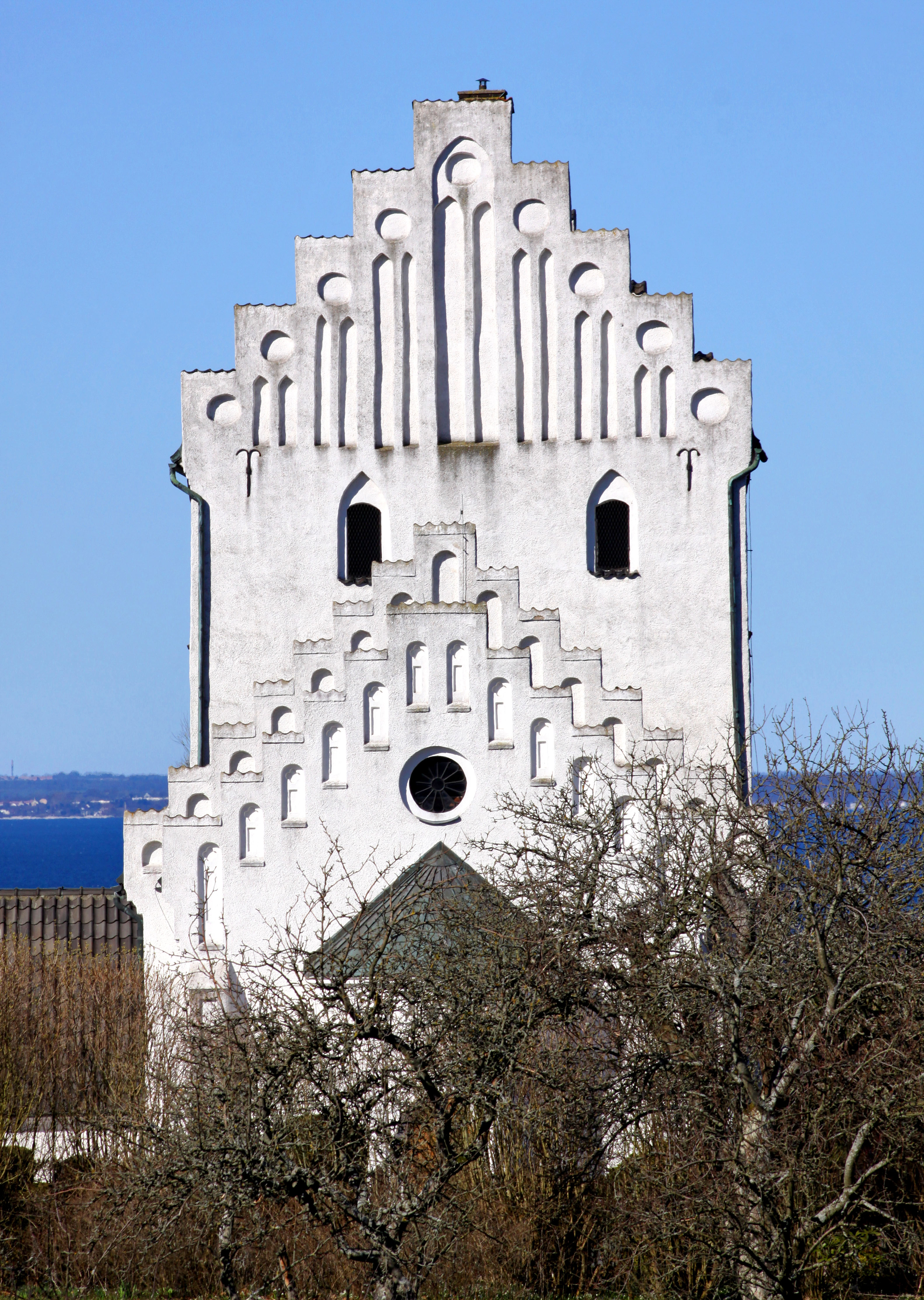 Glumslövs kyrka i Landskrona kommun.